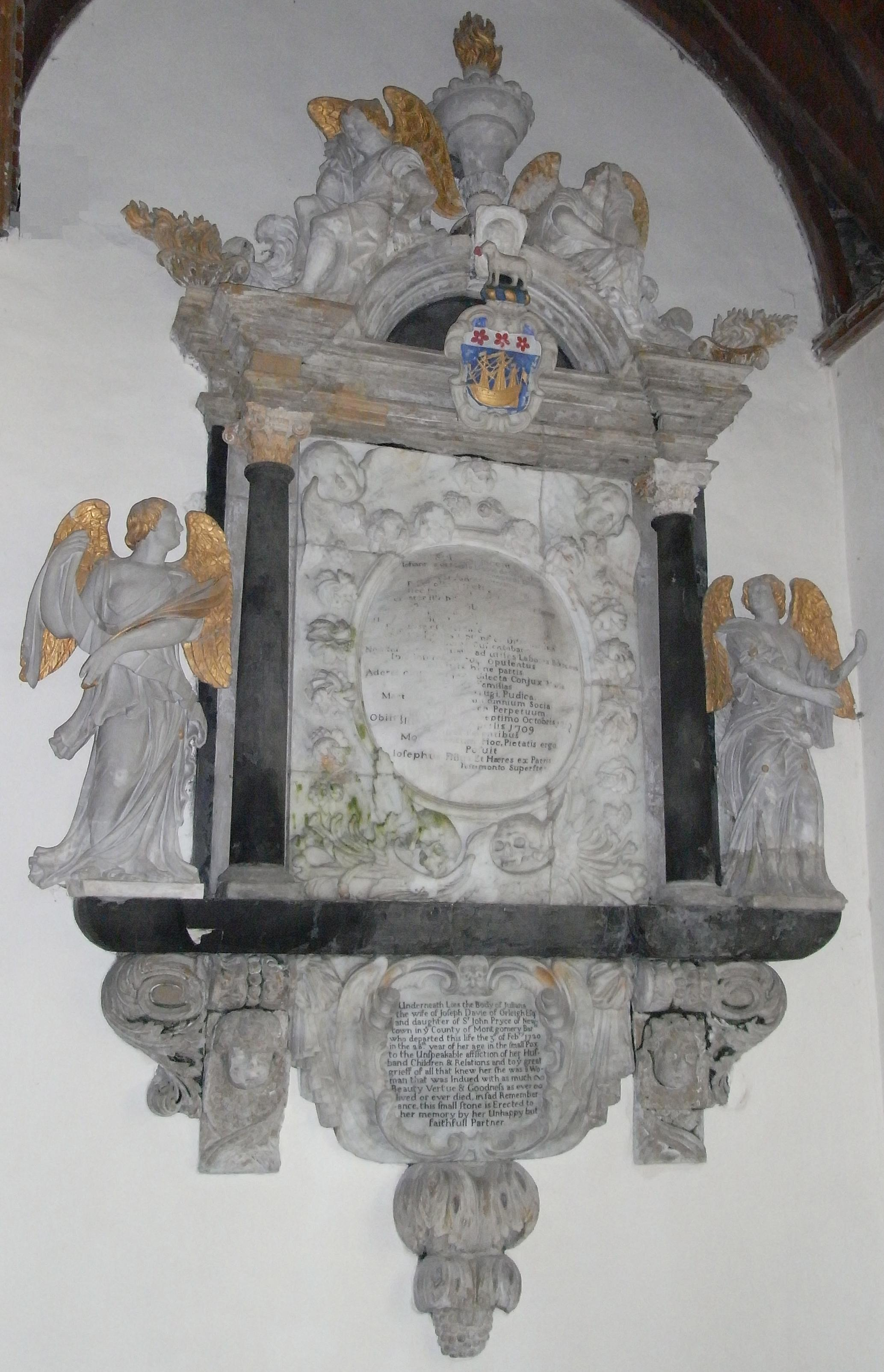 Mural monument to John Davie Esq., (d.1710), Orleigh Chapel, Buckland Brewer Church, Devon